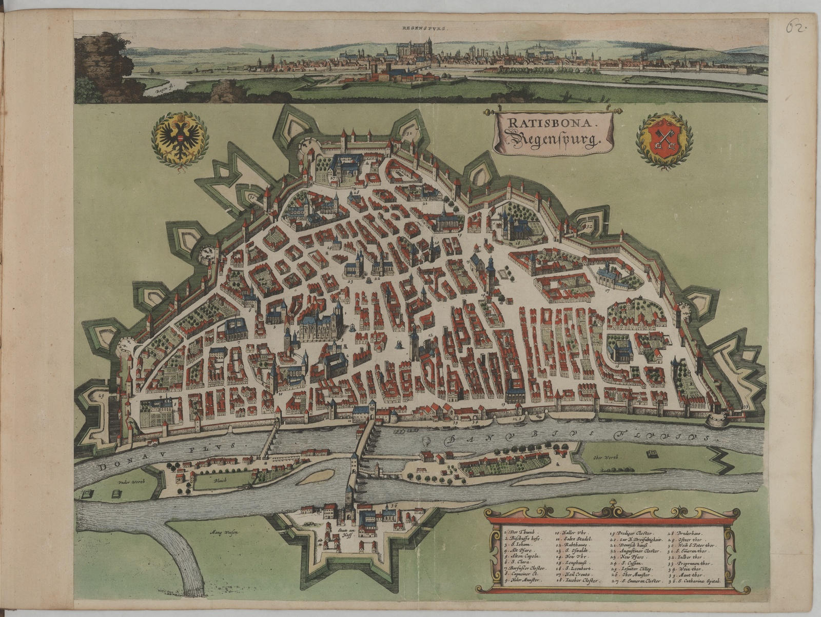 Übersichtskarte von Regensburg, um 1695 aus Theatrum urbium von Johann Georg Starcke Sächsische Landesbibliothek - Staats- und Universitätsbibliothek Dresden (SLUB)